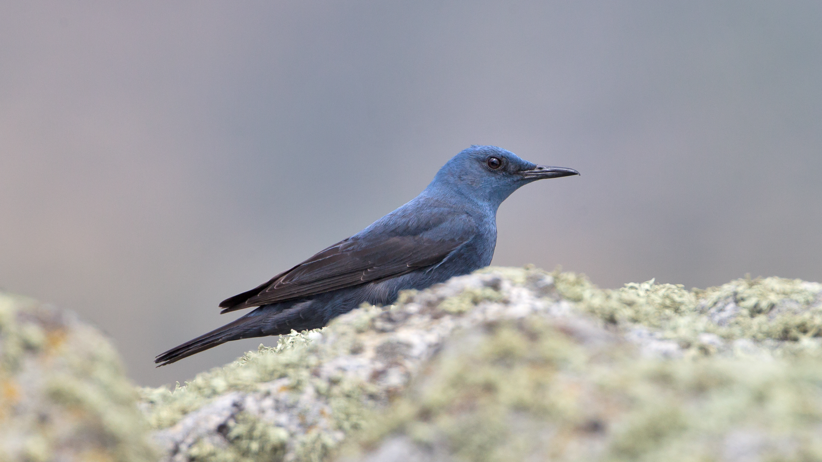 Roquero solitario